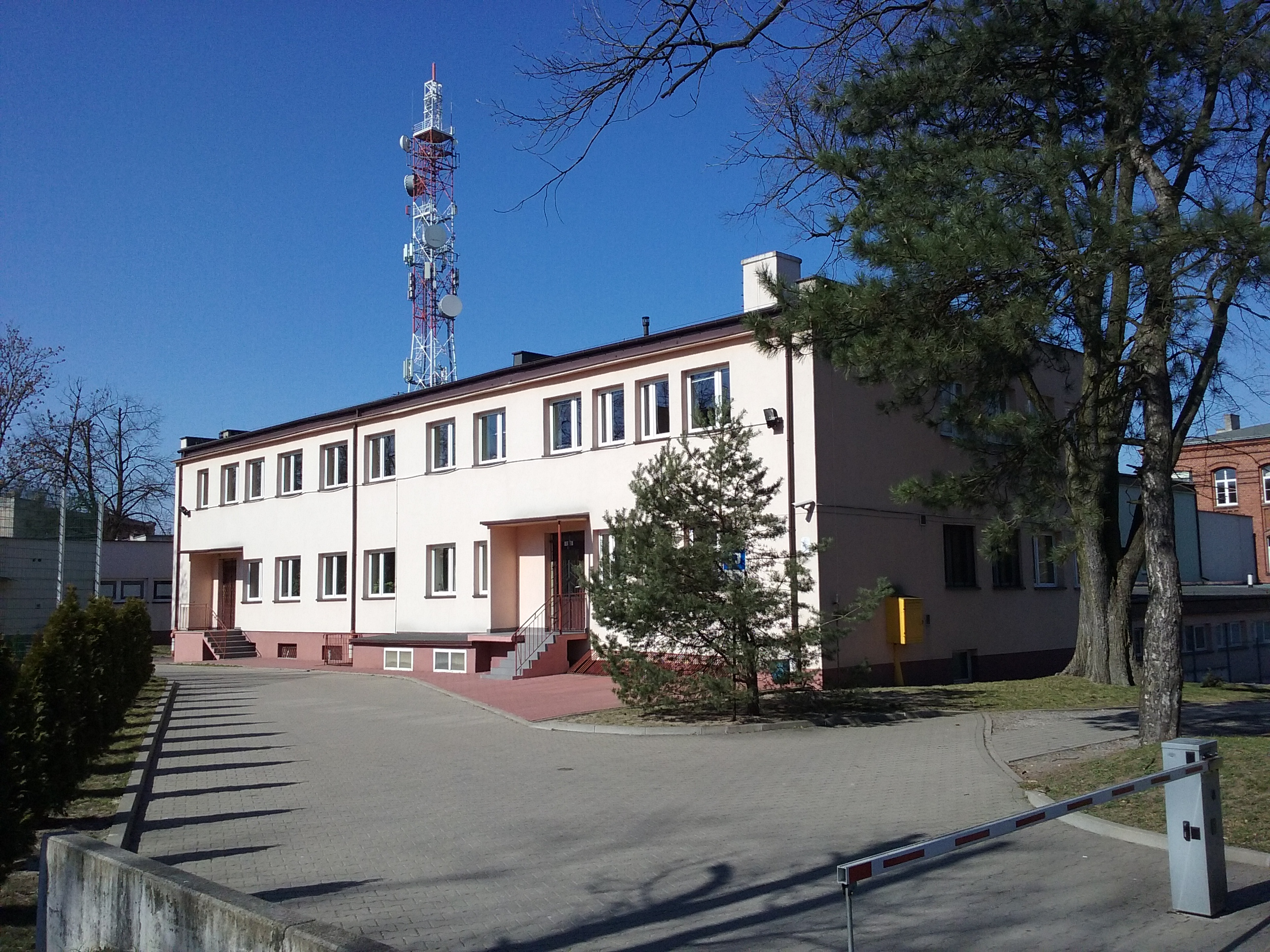 Tomaszów Mazowiecki w województwie łodzkim. Stołówka szkolna przy I Liceum Ogólnokształcącym in.Jarosława Dąbrowskiego